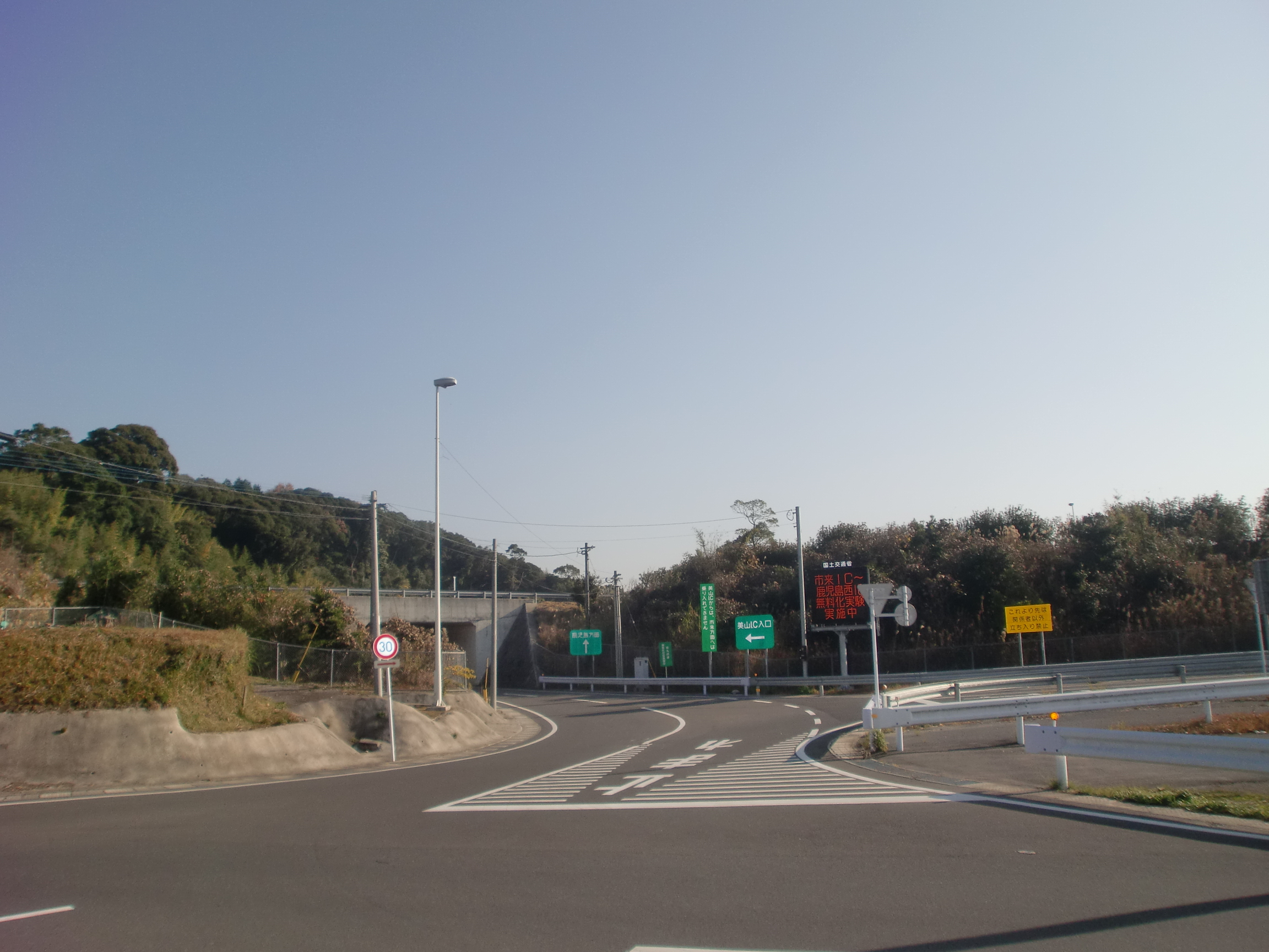 南九州西回り自動車道の美山インターチェンジの外観。